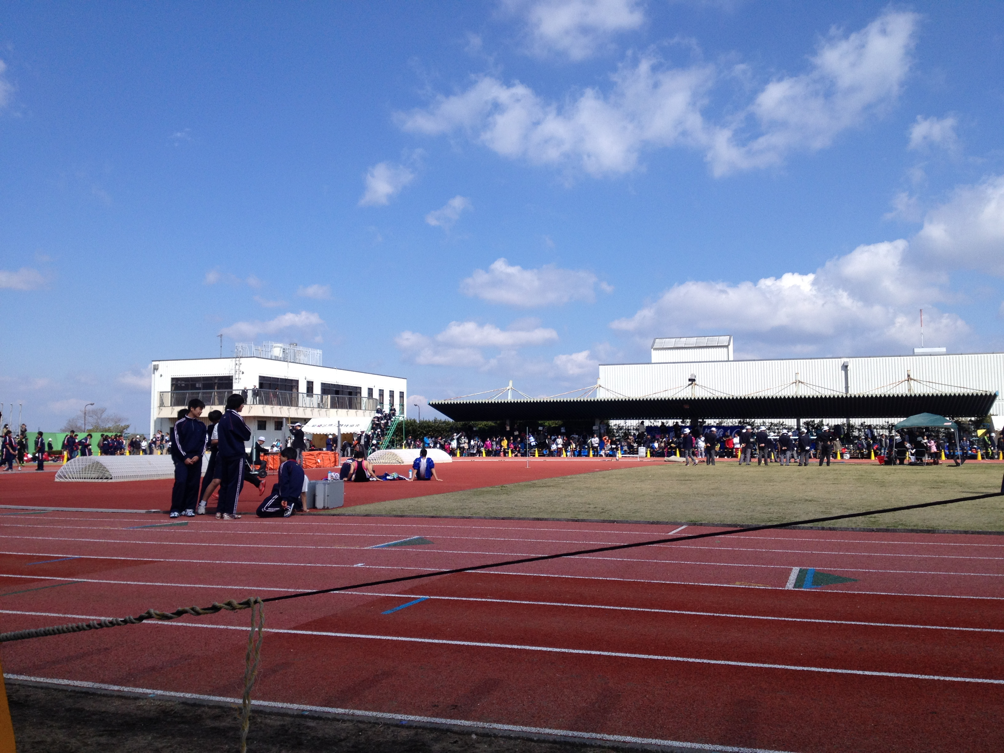 新河岸陸上競技場